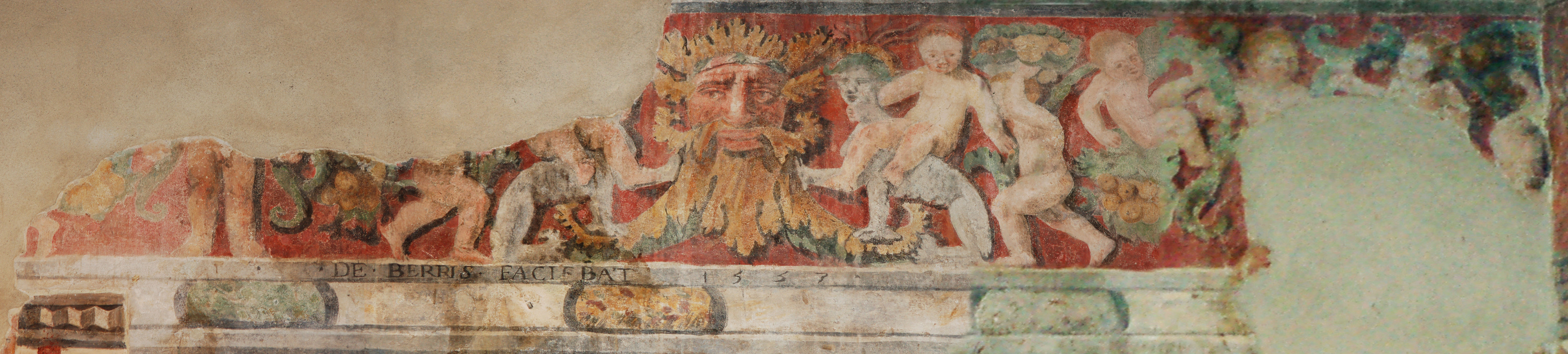 Grottesche realizzate da Alessandro Berri nel 1557 nella "Sala dell'Arengo" del Palazzo Comunale (Castello Podestarile dei Torriani e Bandello) di Castelnuovo Scrivia (Alessandria)